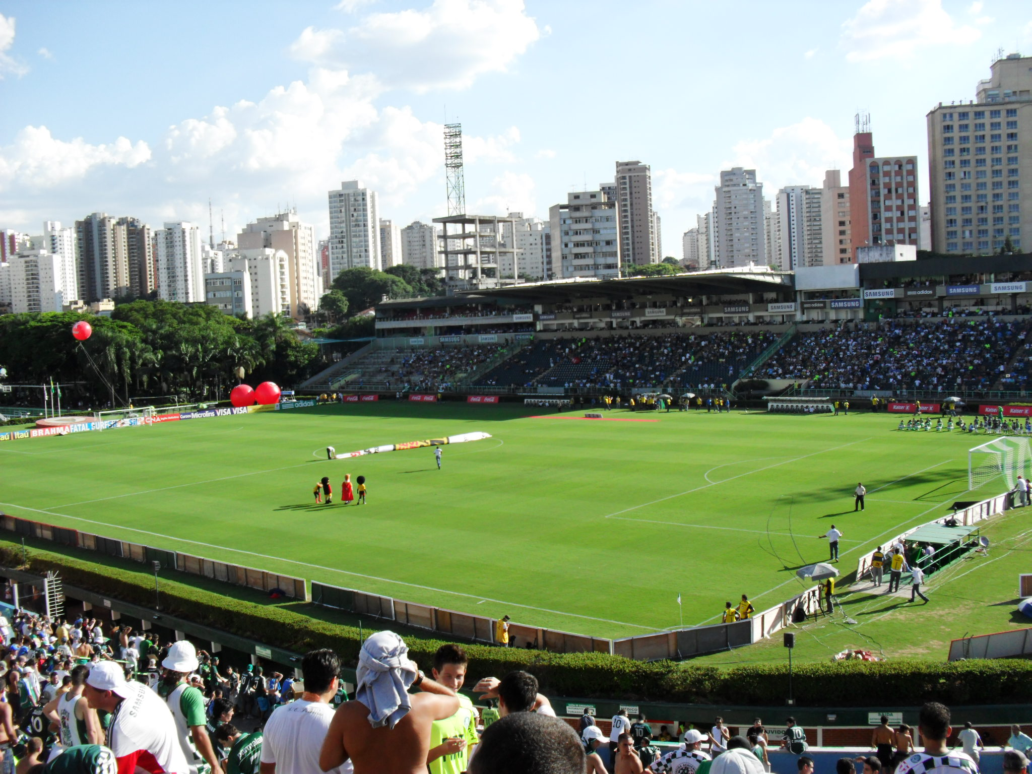 Vista do Estádio Palestra Itália em dia de jogo do Palmeiras